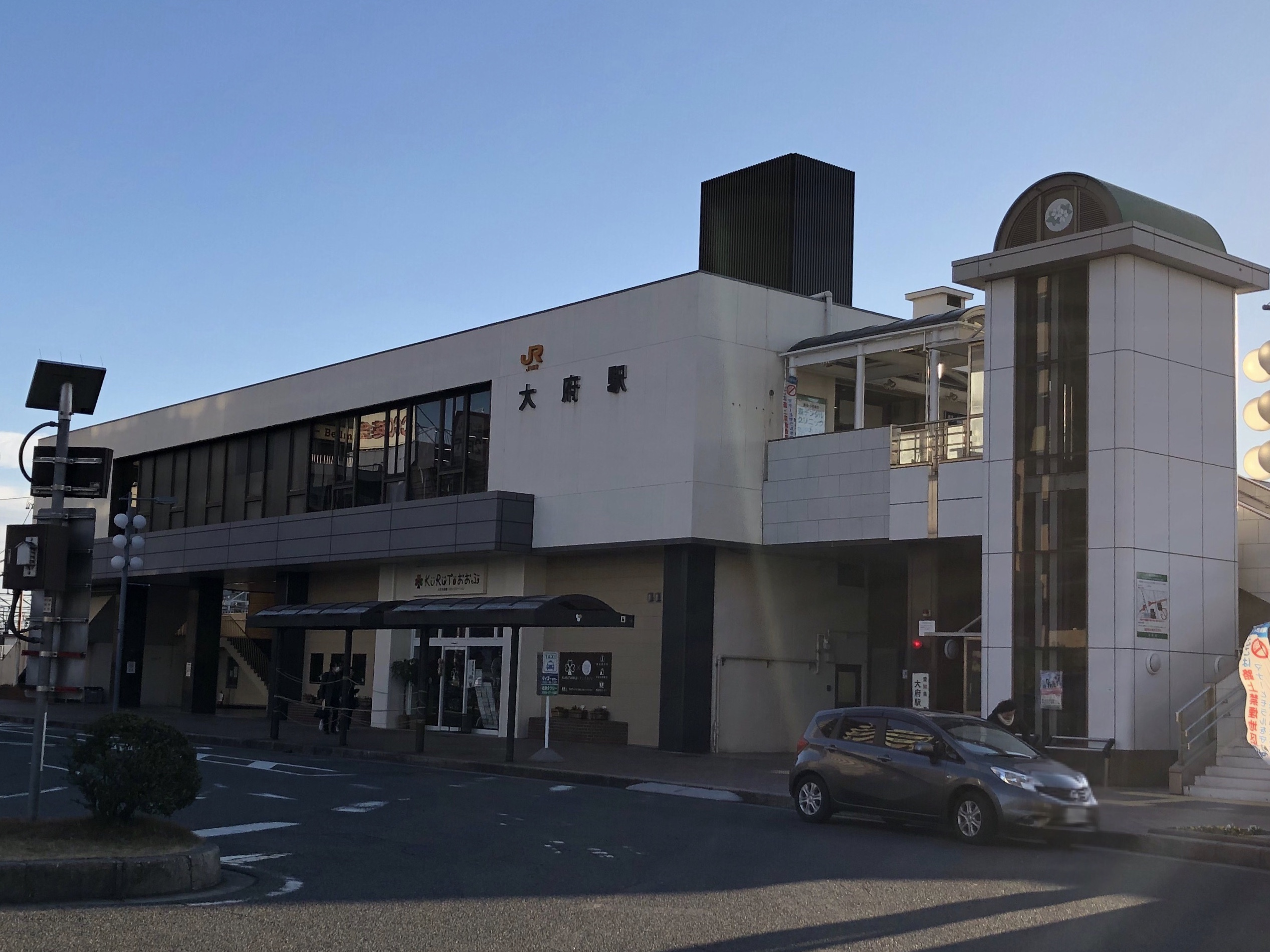 JR大府駅(愛知県大府市中央町三丁目135) 撮影日:2018年3月31日